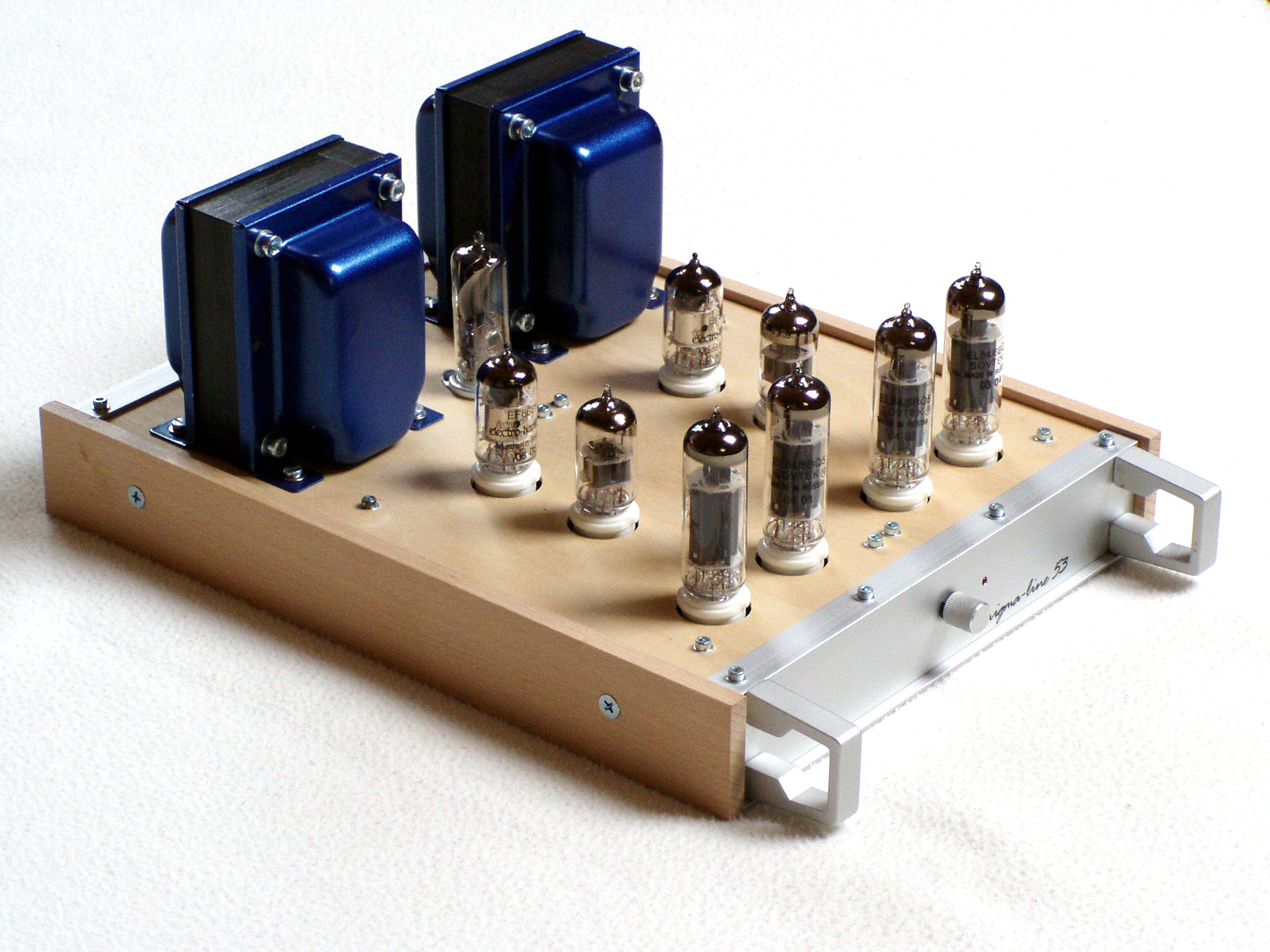 Gegentakt-Röhrenverstärker ohne Netzteil